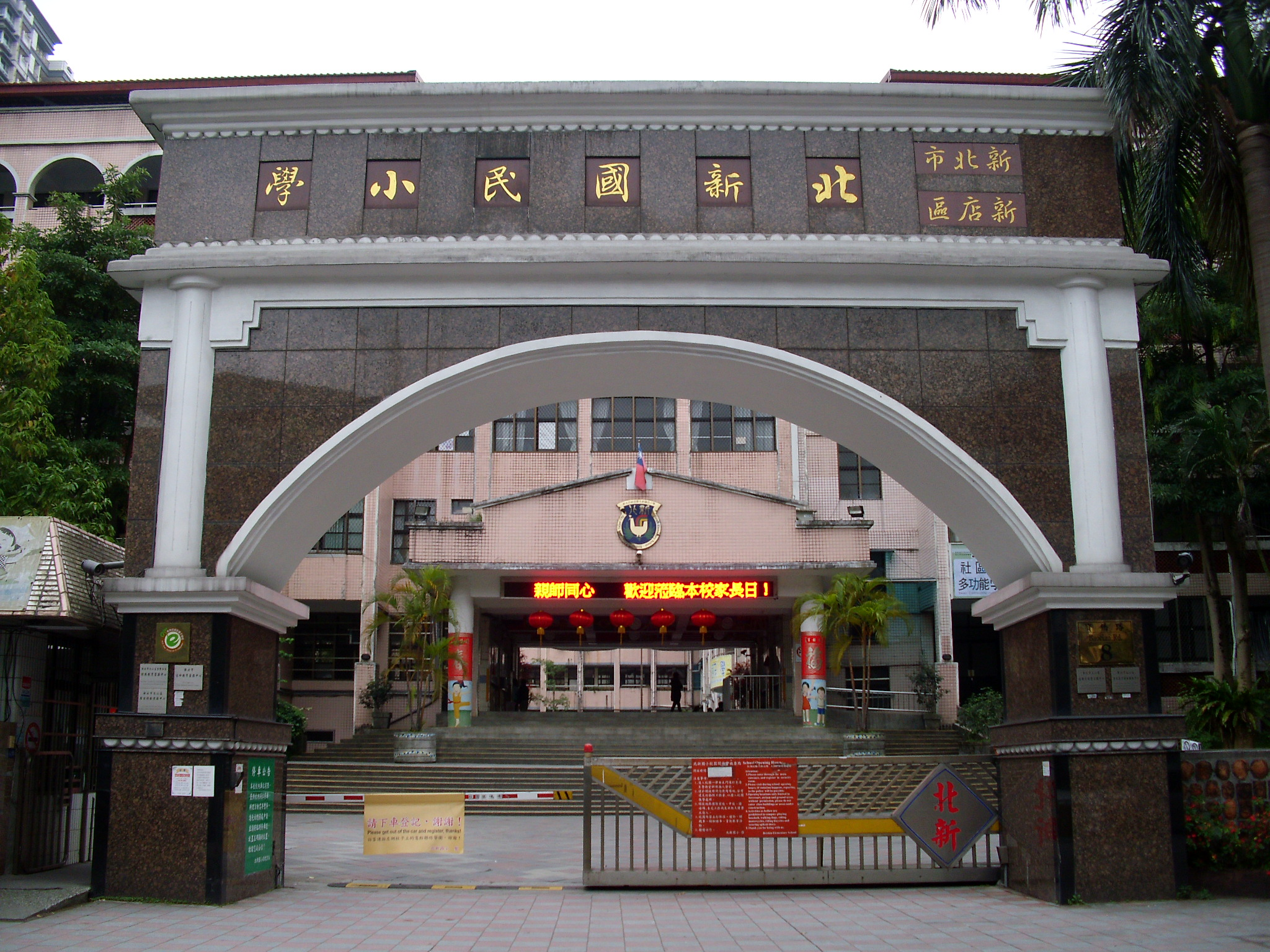 Bân-lâm-gú: 北新國小校門